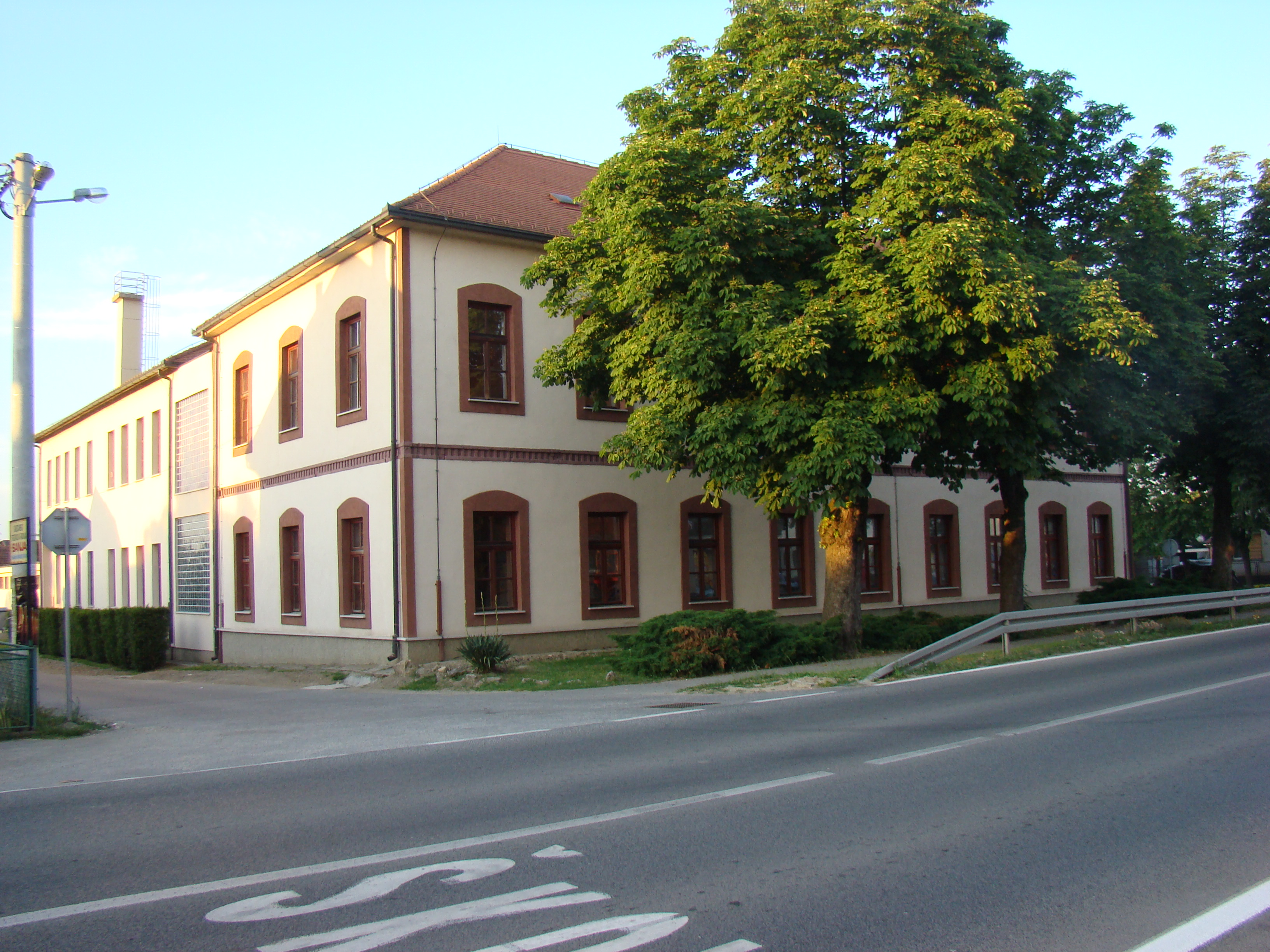 Škola u Selima kraj Siska